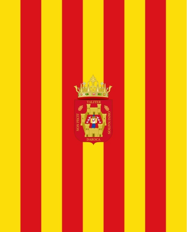 La bandera de Daroca, está formada por 5 franjas amarillas y 4 rojas, considerado como la “señal real” de Aragón, en recuerdo de la entrega de las señal o banderas reales realizada por Jaime I, sobre la que se coloca el escudo de la Ciudad.